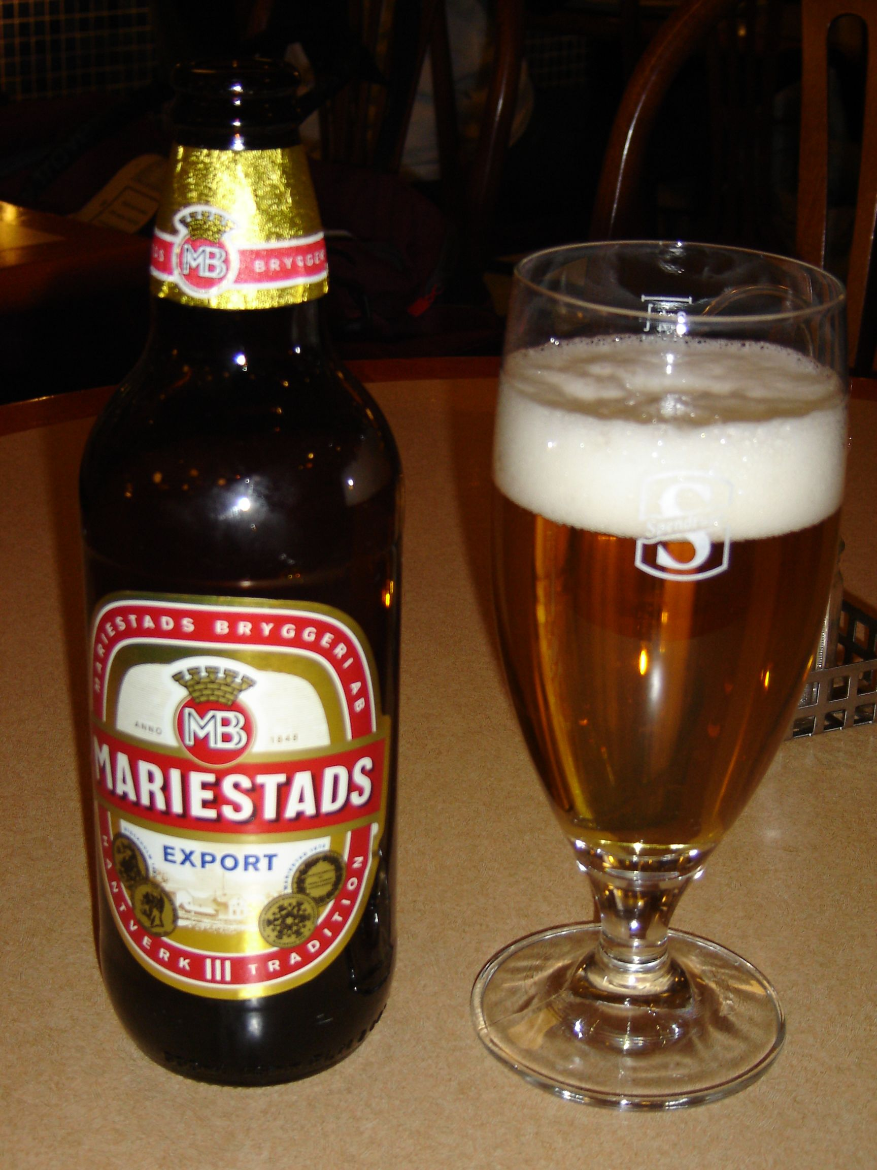 Mariestads är ett av Spendrups ölmärken.Swedish beer